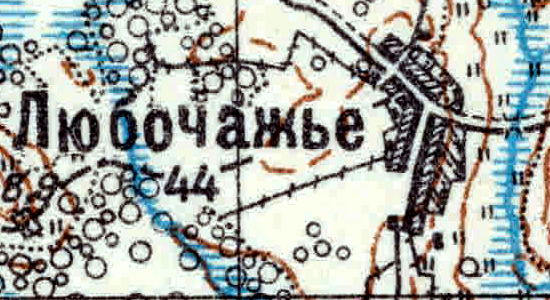 Топографическая карта Ленинградской области, квадрат VIc-27 (Залустижье), деревня Любочажье